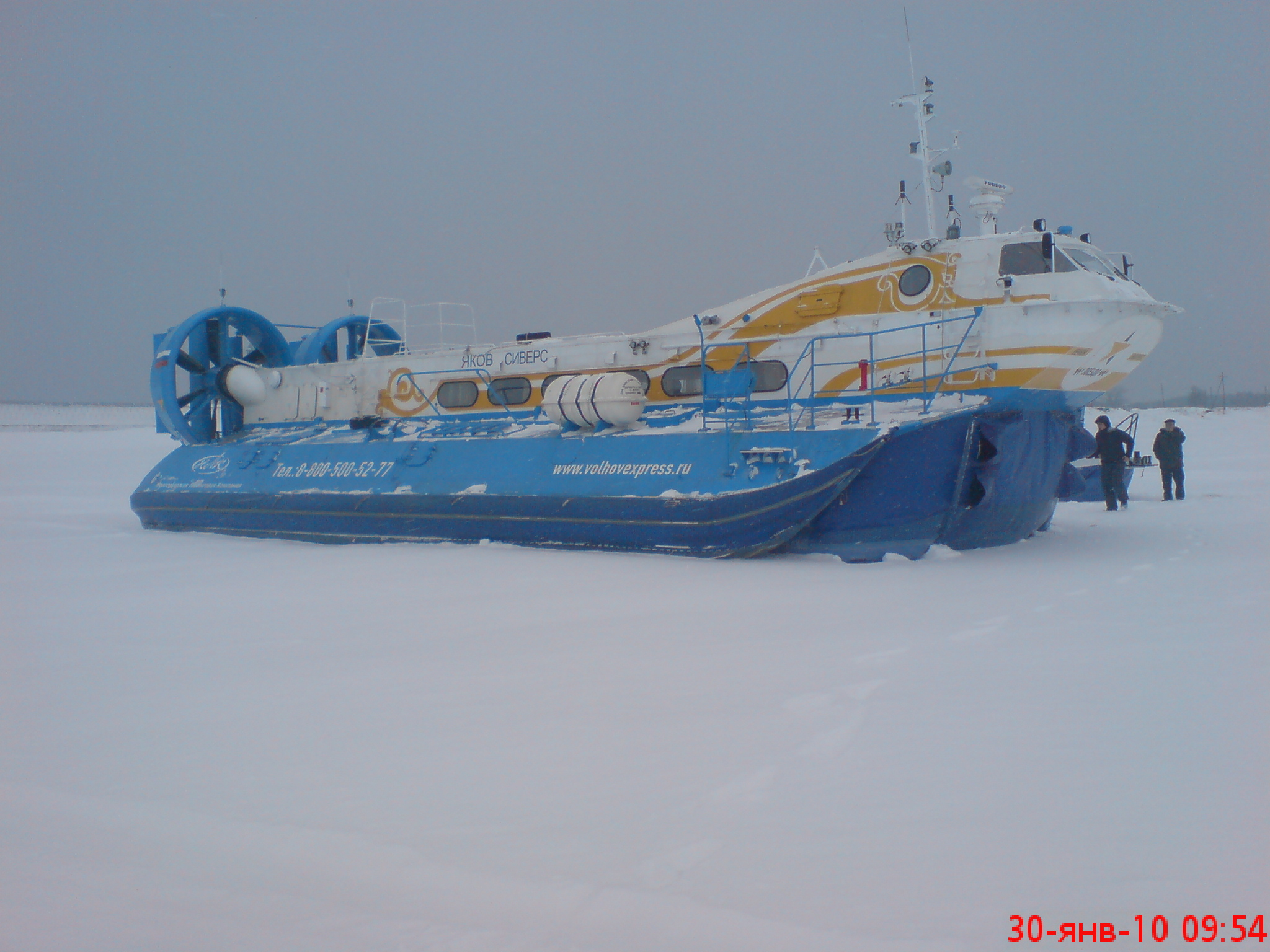 СВП А48 зимой